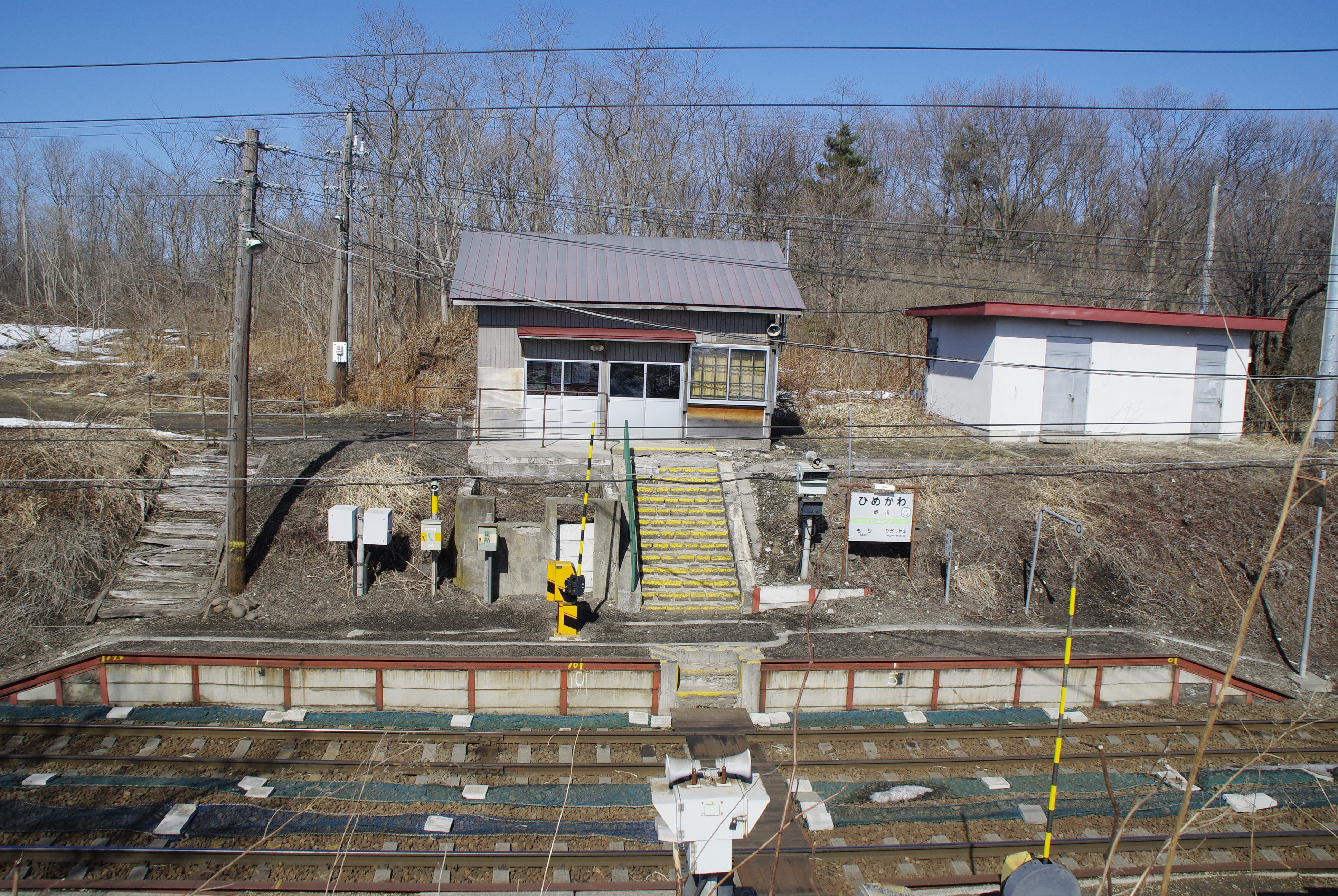 JR北海道函館本線姫川駅の駅舎とホーム外観